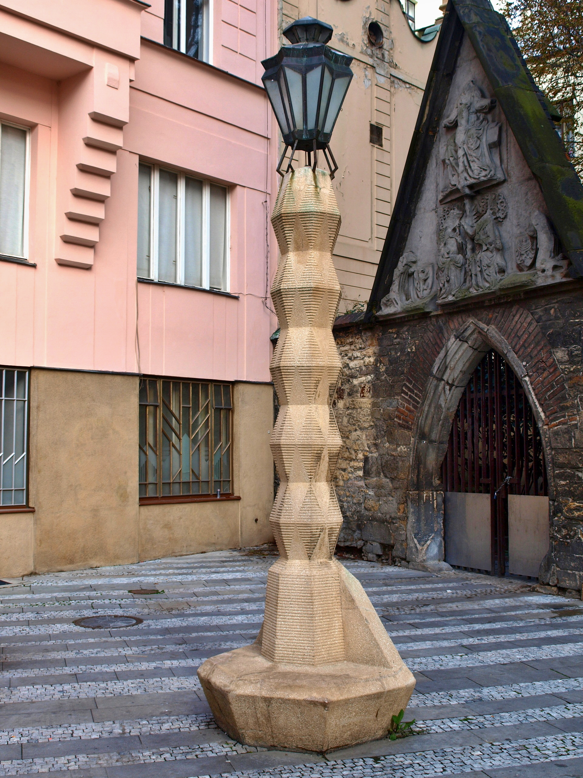 Praha-Nové Město, kubistická pouliční lampa Emila Králíčka